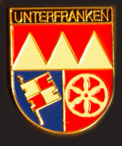 Bayerische Polizei Polizeipräsidium Unterfranken